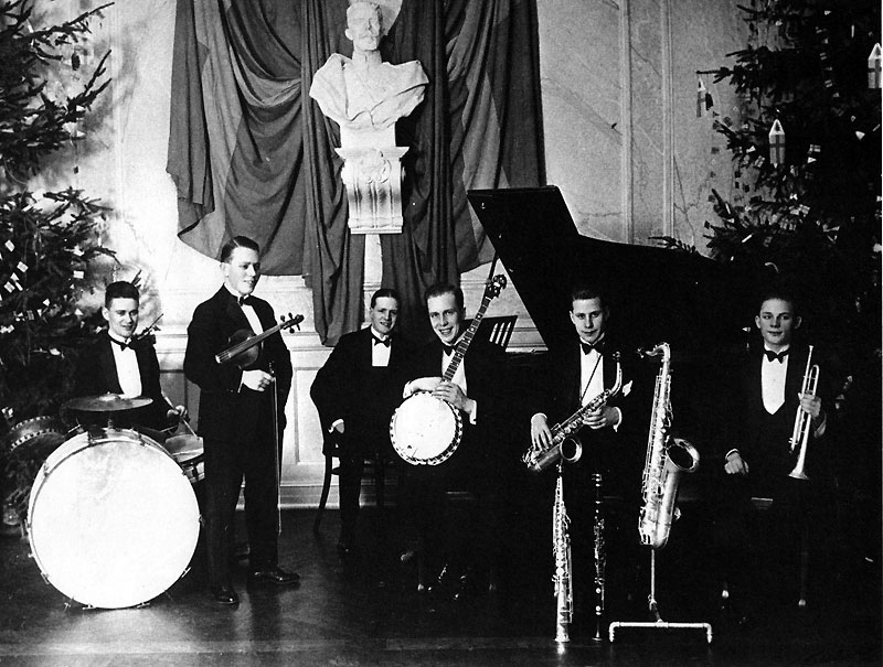 Folke "Göken" Andersson med sin orkester på Frimurarhotellet i Linköping